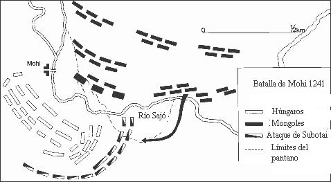 Esquema de la Batalla de Mohi. Esquema de la batalla de Mohi, Hungría.